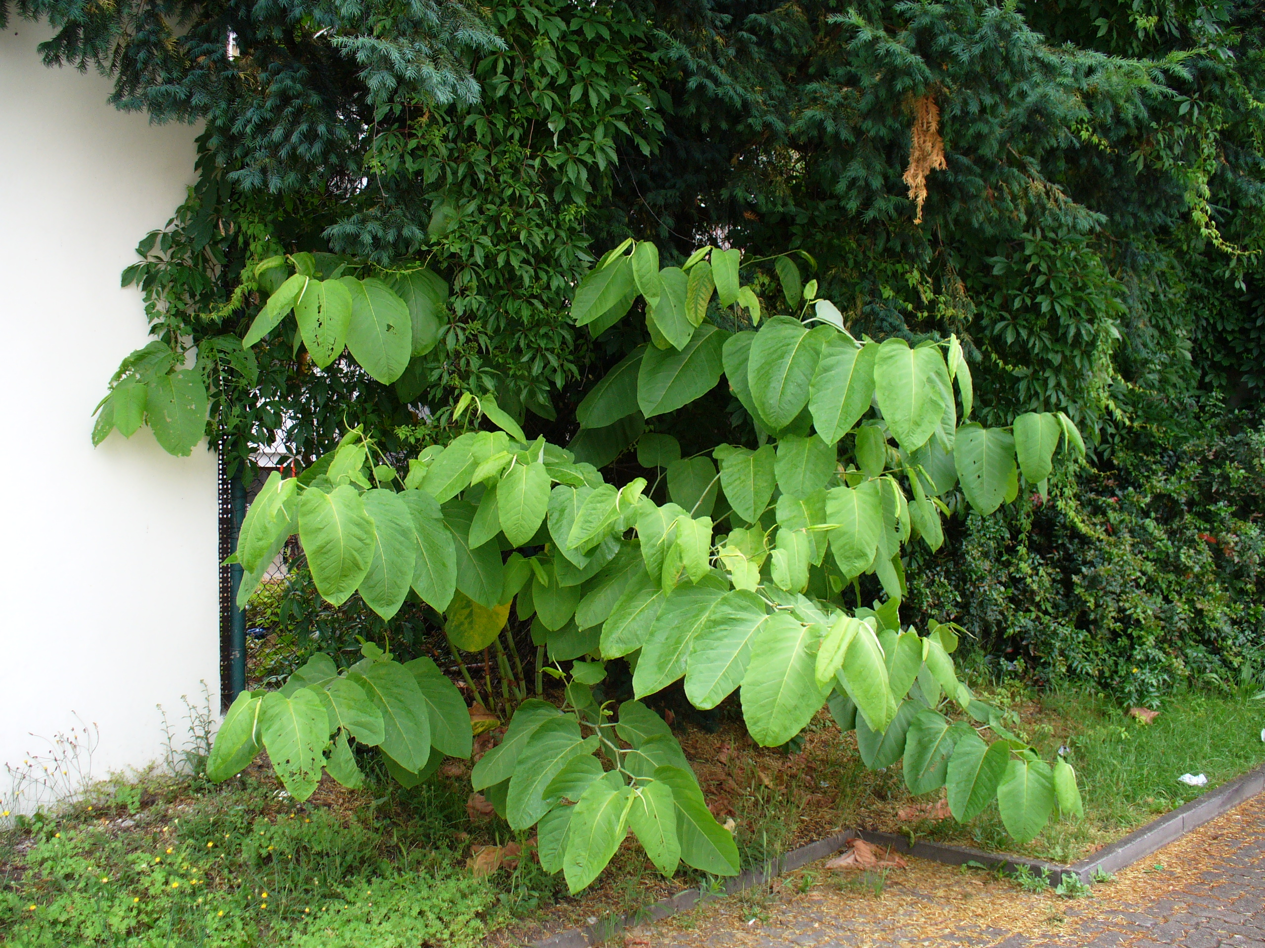 Fallopia sachalinensis